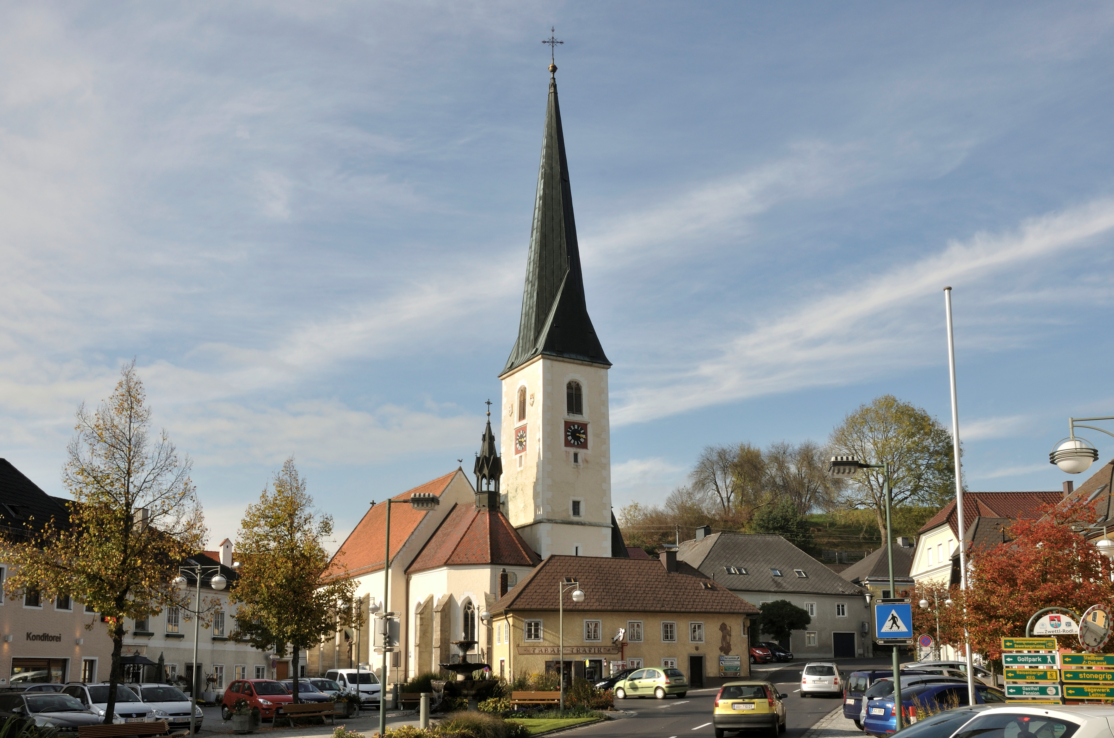 Kath. Pfarrkirche Mariä Himmelfahrt